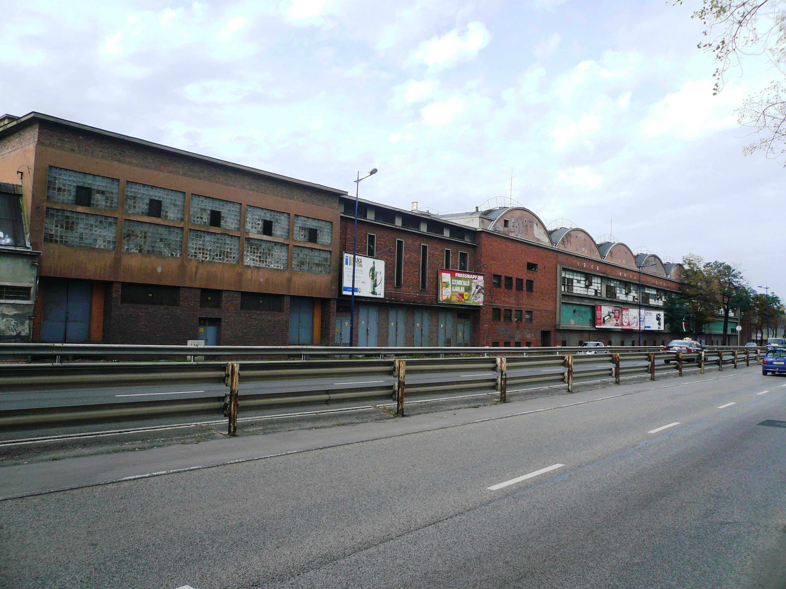 A Lőrinci Fonó (korábban Filtex gyár) a Gyömrői úton.